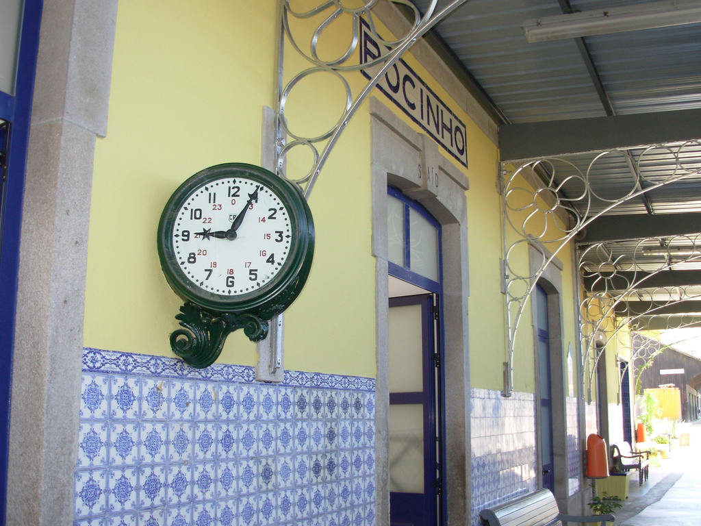 Relógio na Estação do Pocinho.